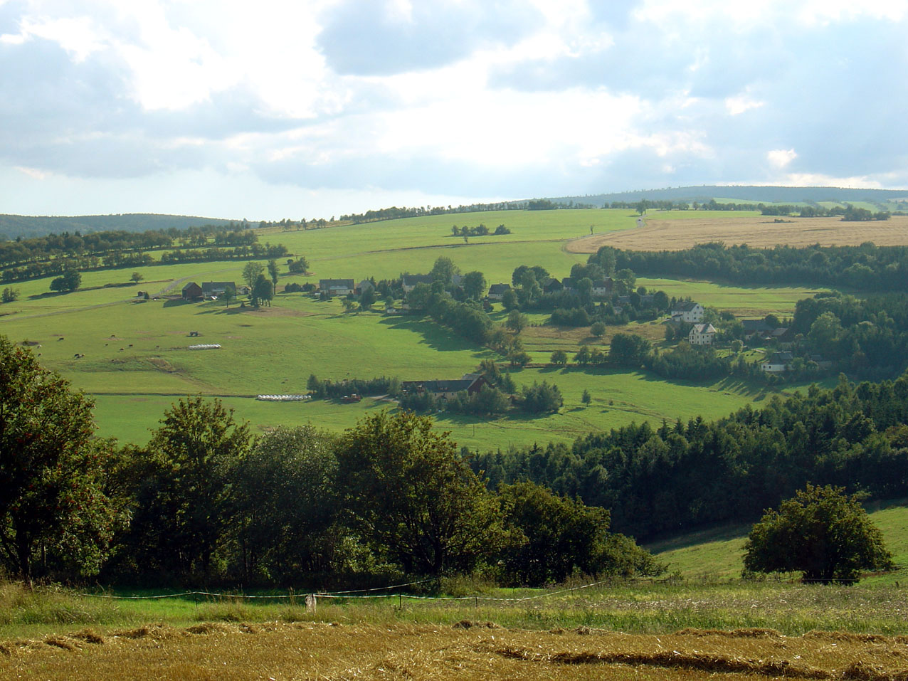 Gottgetreu (Fürstenau)